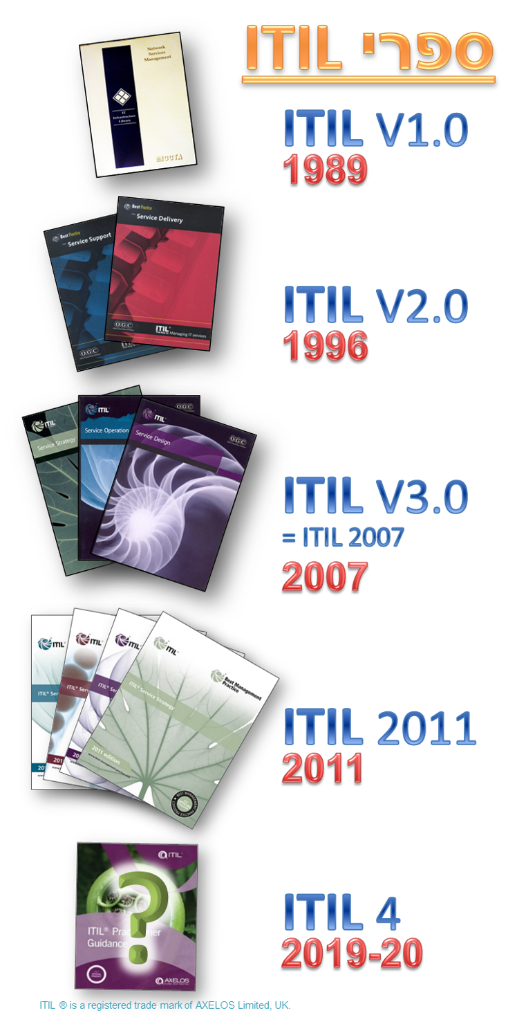 ארבעת הגרסאות של ספרי ITIL